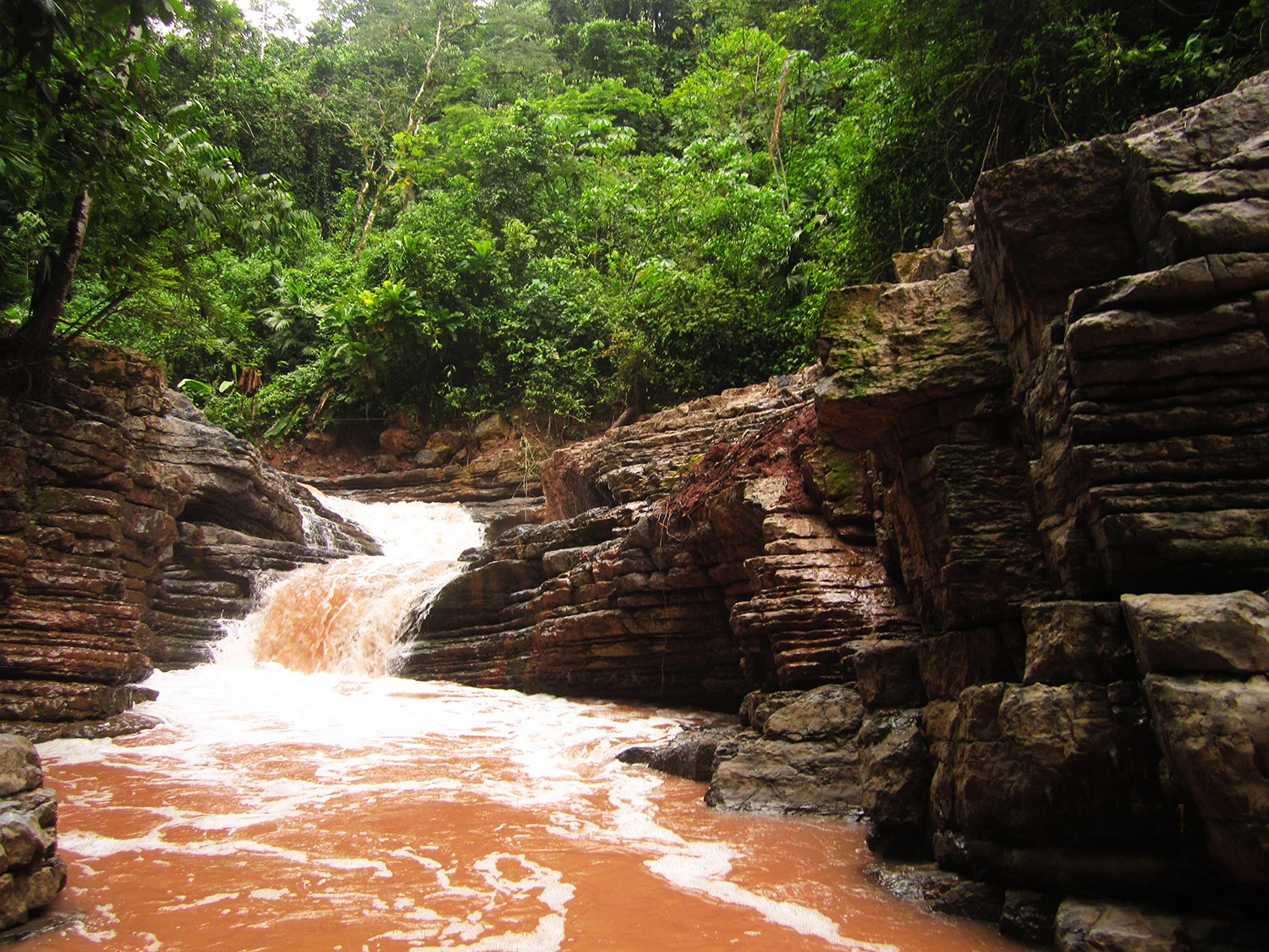 Cascada Escalera